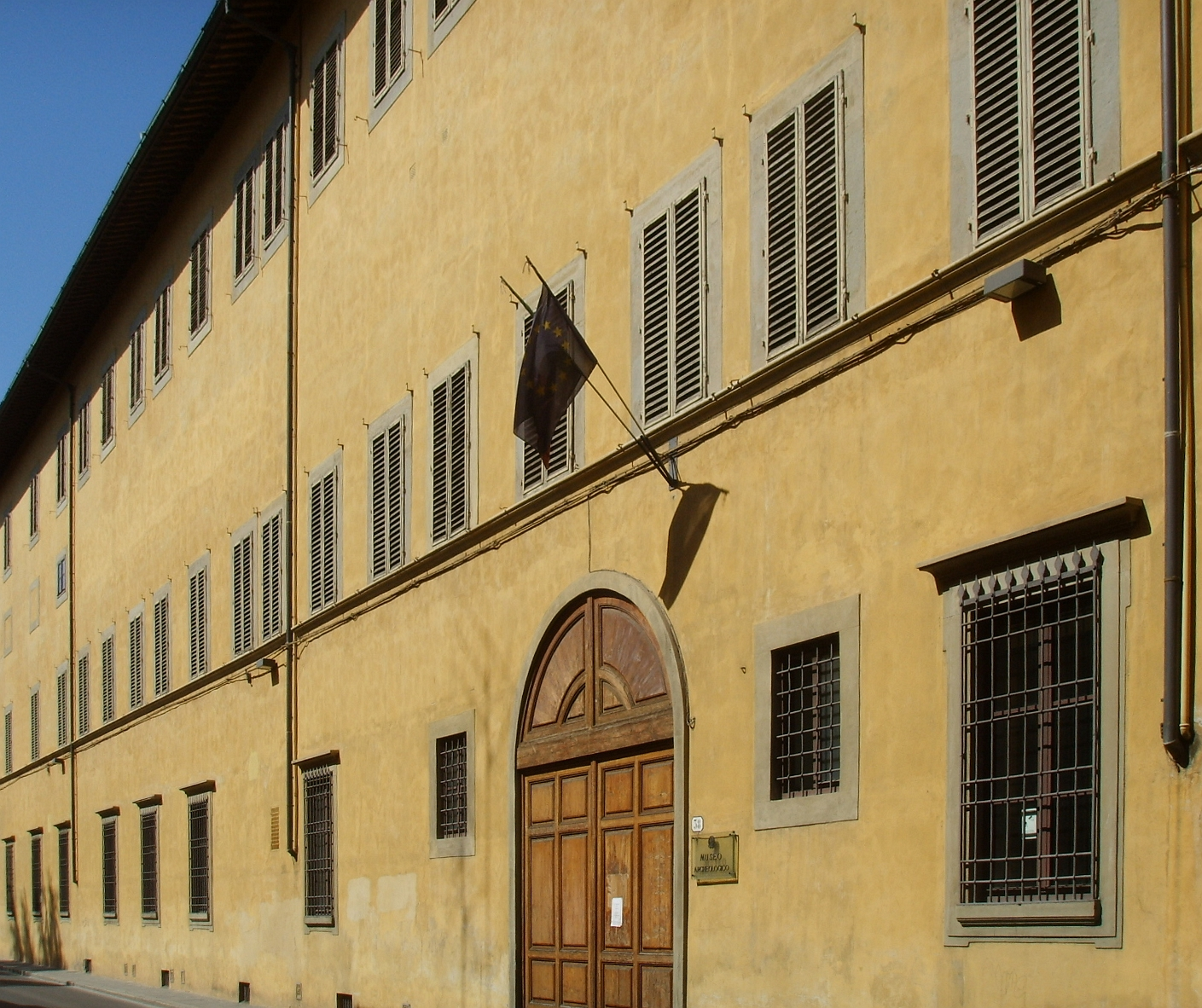 Il Palazzo della Crocetta, in piazza Santissima Annunziata 1, risale al 1620, e fu costruito da Giulio Parigi come residenza della principessa Maria Maddalena de' Medici. Oggi ospita il Museo archeologico nazionale di Firenze.